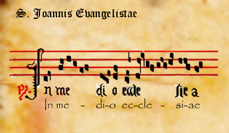 Tropo tipo Melisma corto "In medio ecclesie", de responso de S. Juan Evangelista